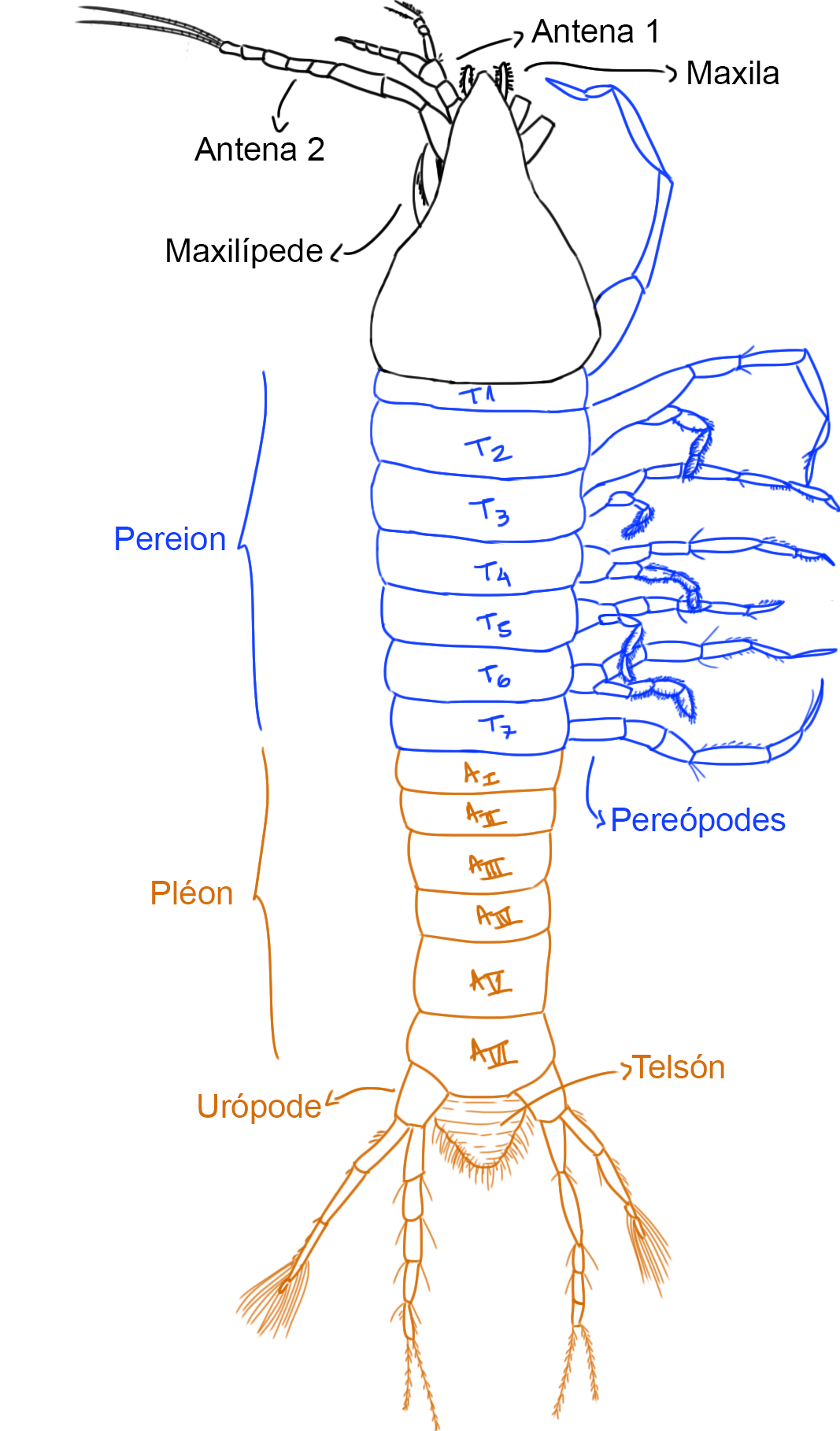 Morfologia externa de Thetispelacaris remex. Vista dorsal. Apêndices aos pares, representados de apenas um dos lados.